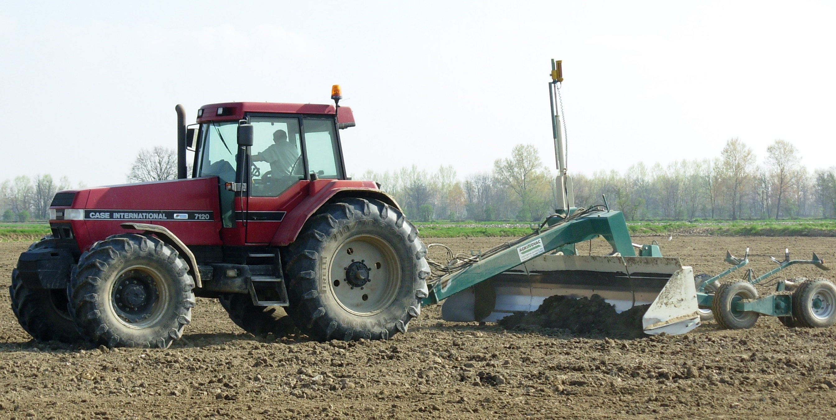 Trattore Case IH 7120 con livella laser